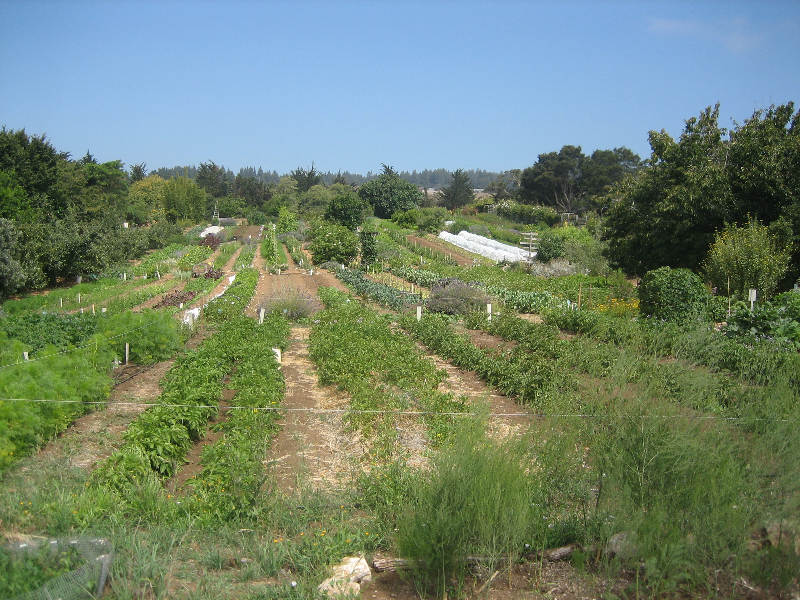 organic farm, ucsc